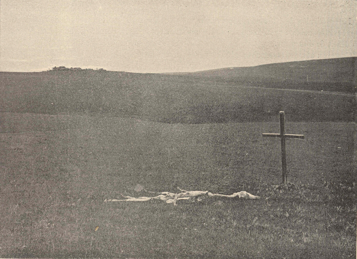 Fotografía del sitio donde fue muerto Chiquito Saravia junto a restos de su caballo.